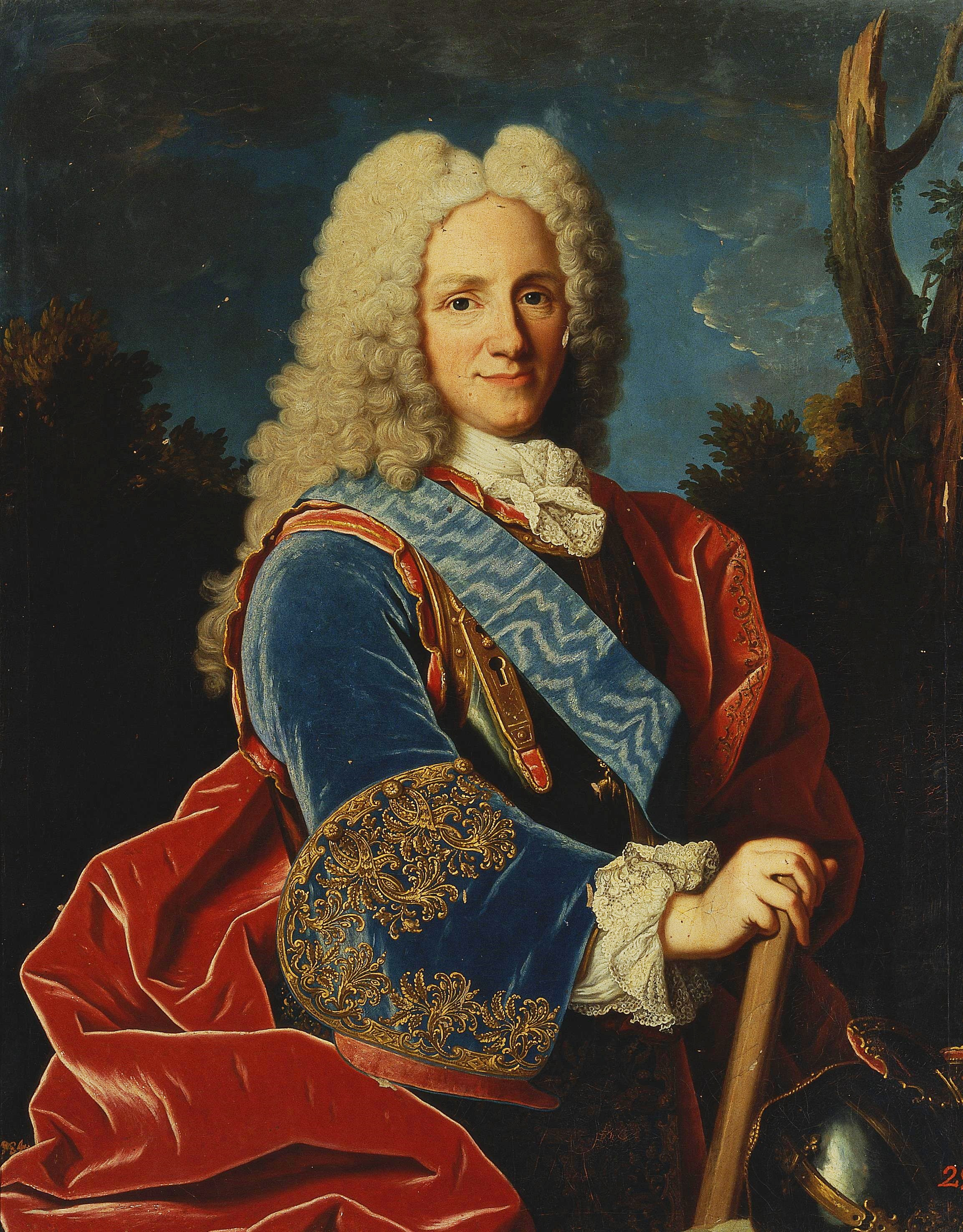 Retrato oficial del rey Felipe V de España (1683-1746), que fue nieto del rey Luis XIV de Francia y el primer monarca de la Casa de Borbón en España. Nació en Versalles y fue proclamado rey de España en 1700. Casó dos veces, tuvo numerosos hijos y falleció en Madrid en 1746.